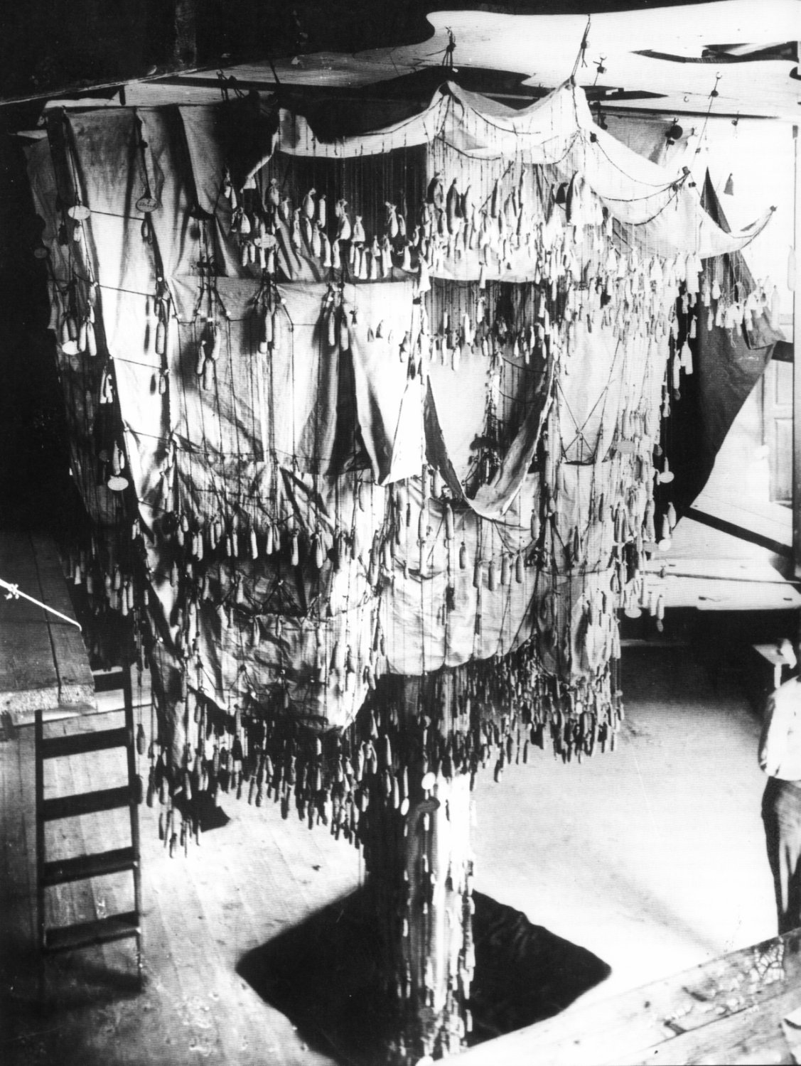 Maqueta polifunicular de la iglesia de la Colonia Güell, de Antoni Gaudí (1898-1908)